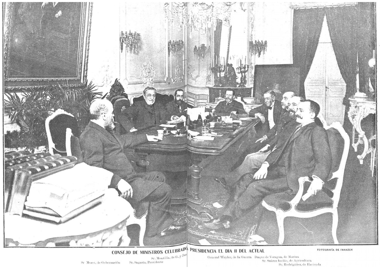 Consejo de Ministros. Fotografía de Christian Franzen.